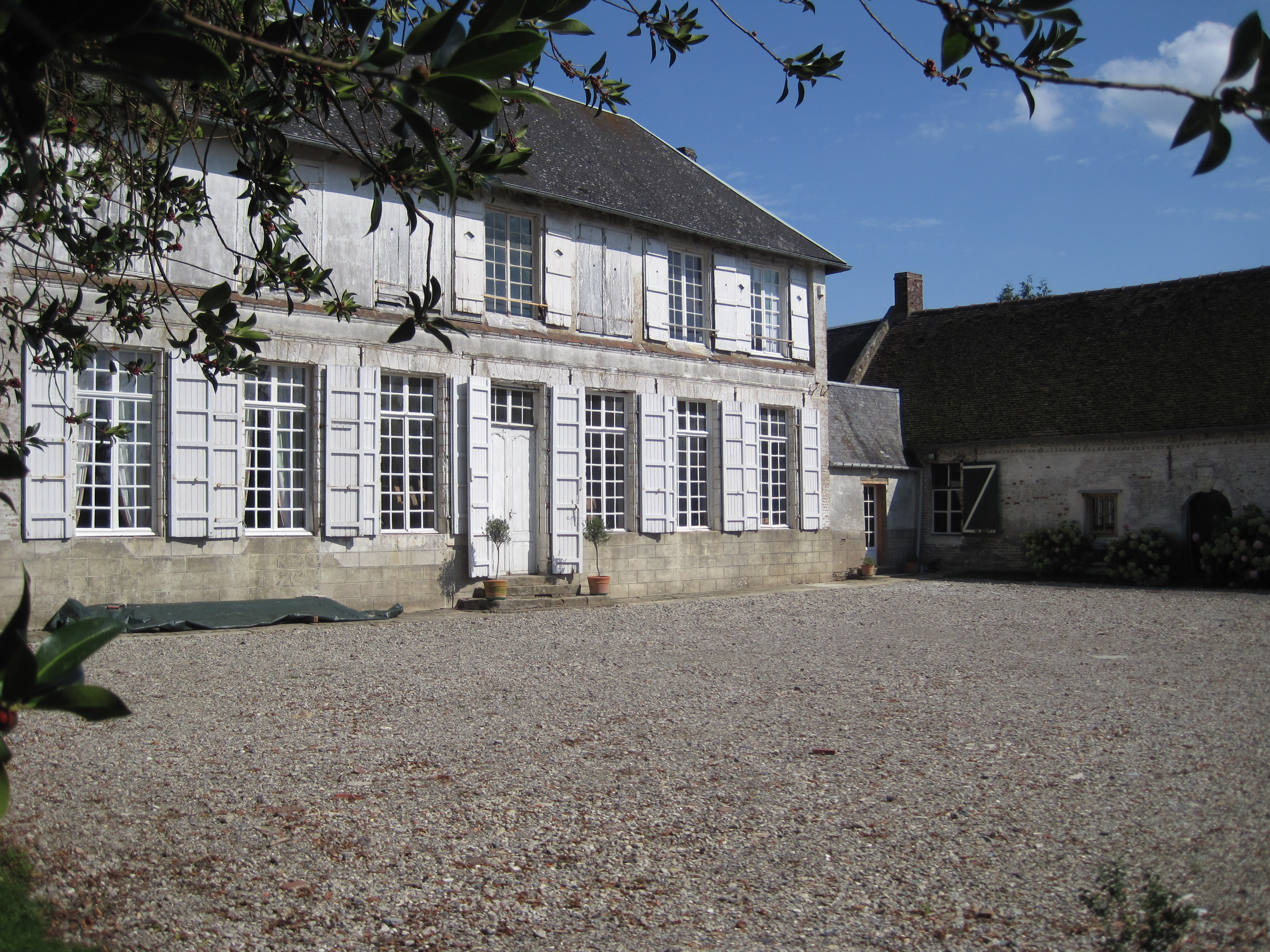 Pommera